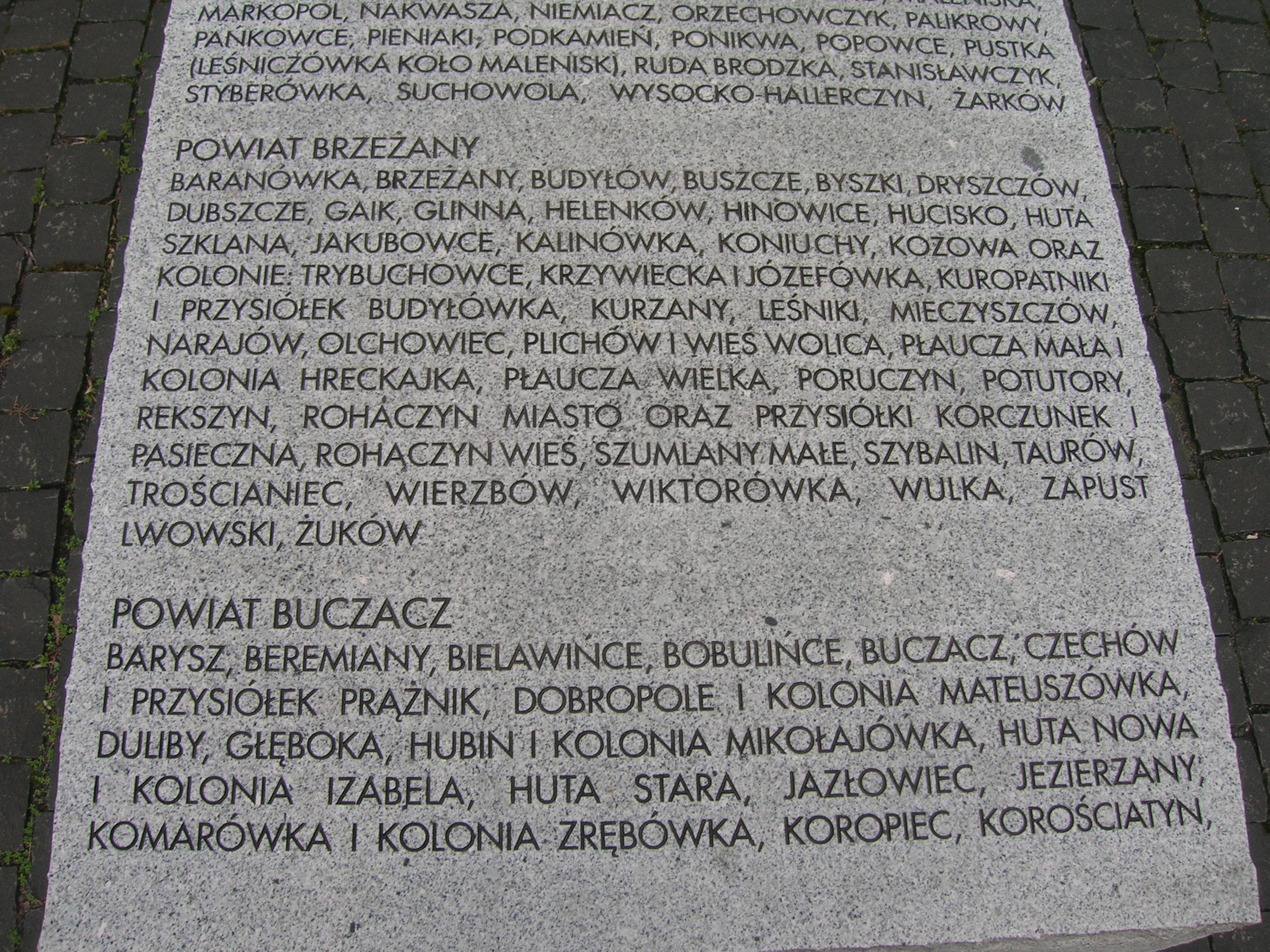 tablica powiaty Brzeżany i Buczacz